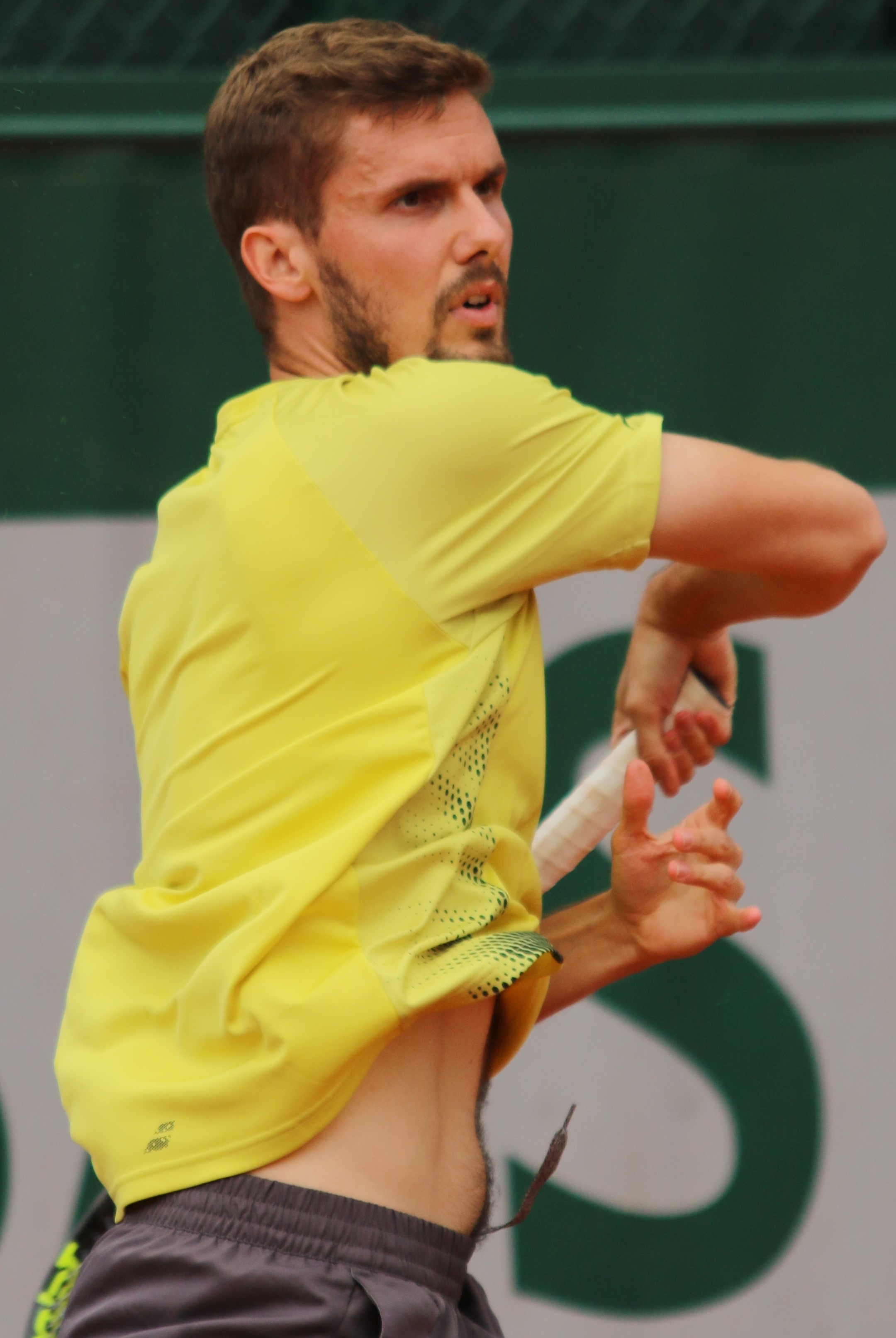 Otte RGQ19 (36)